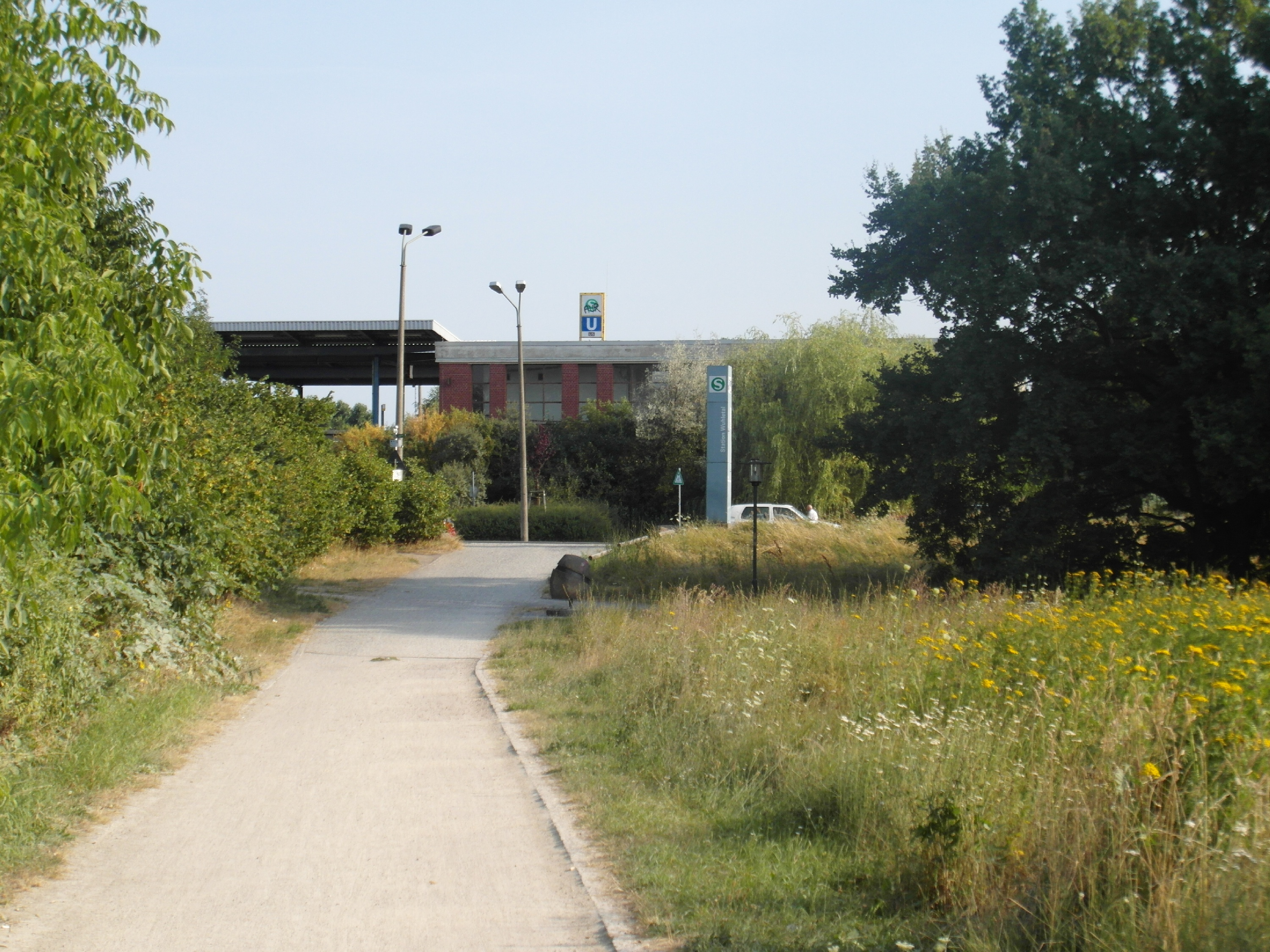 Ein gemeinsamer Bahnhof mit bahnsteiggleichem Übergang zwischen S- und U-Bahn - Linien S5 und U5